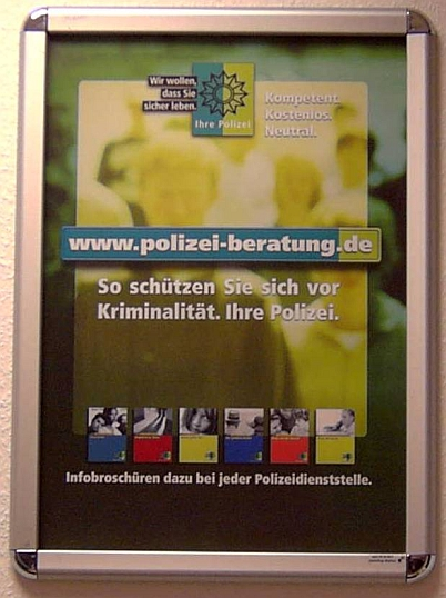 Polizeiberatung Poster, Germany.